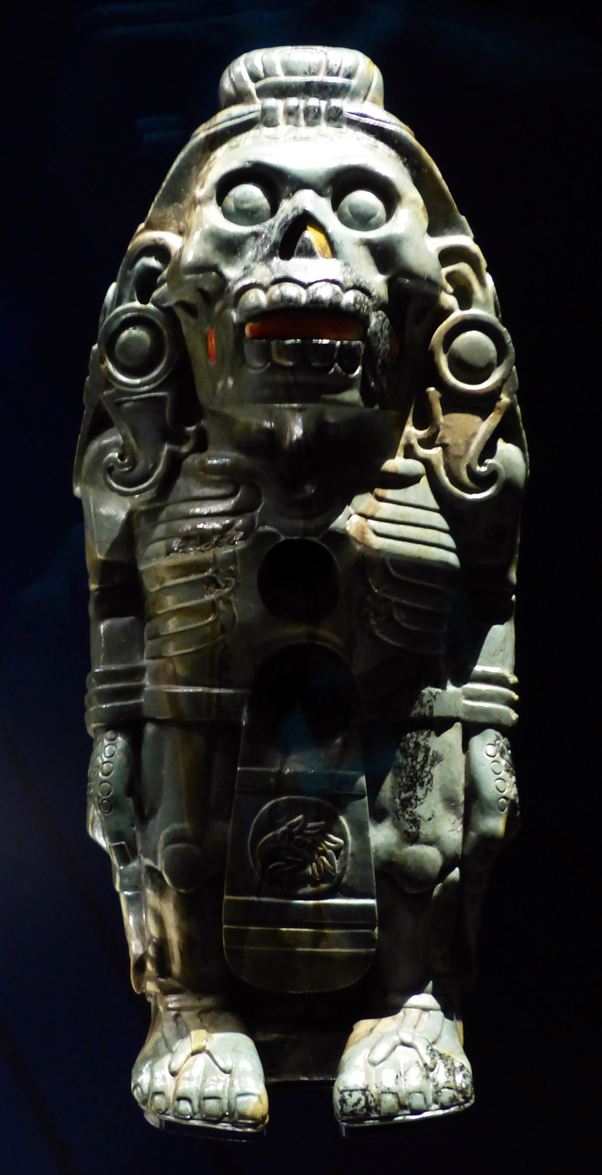 Xolotl, an Aztec god, Mexico before 1521, Landesmuseum Württemberg (Stuttgart) Kunstkammer